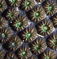 Montastraea faveolata, coralitos